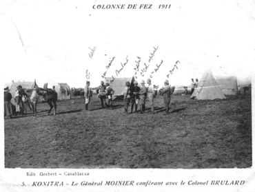 Autorisation accordée par:Webmeister:Ali Tazi Photo: colonne de fez 1911